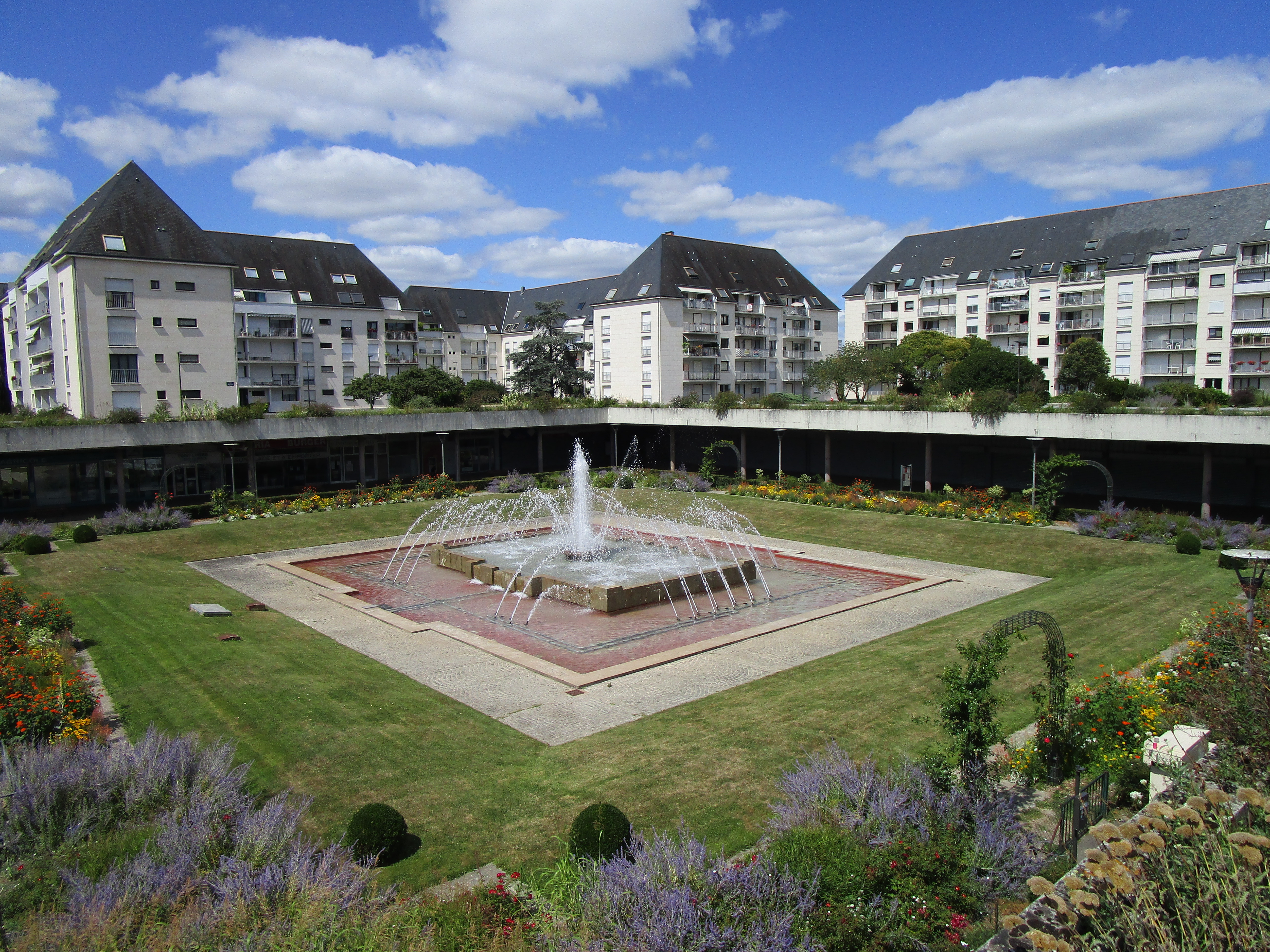 Place de l'amiral Querville, position centrale du quartier des Fontaines à Tours.